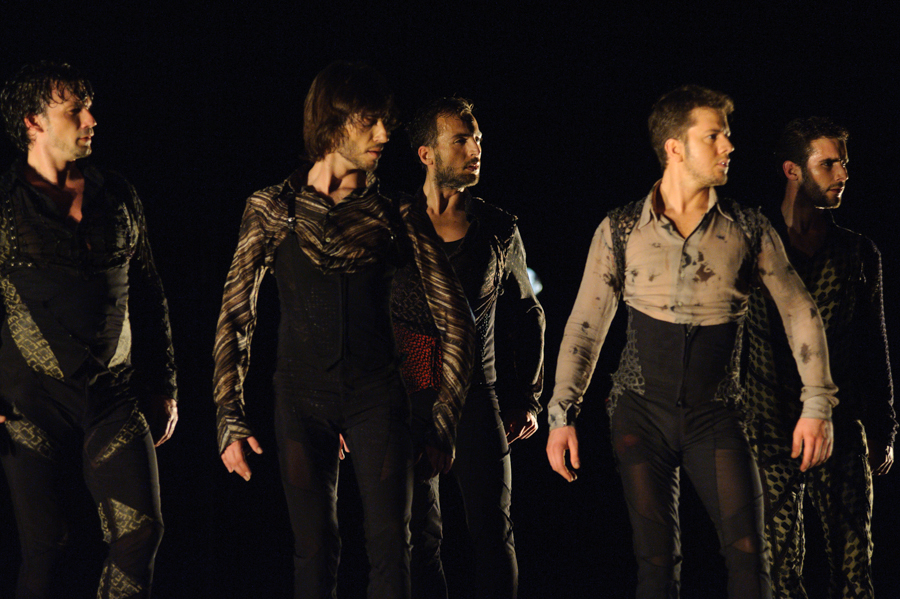 Cía Marco Flores durante su espectáculo "Laberíntica", foto de Paco Villalta.